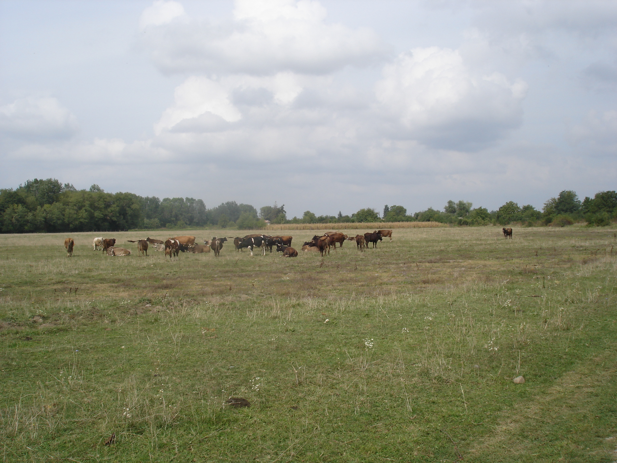 Izlazul comunal al satului Băneşti, comuna Sălcioara, jud. Dâmboviţa, România. Fotografia autorului.